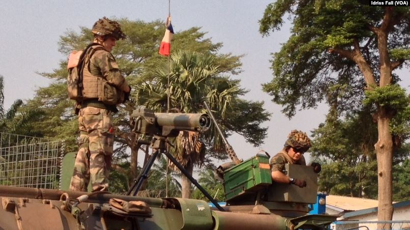 Les soldats français en position à Bangui un VAB armée d'un piste de tir Milan, République Centrafricaine. Décembre 22, 2013